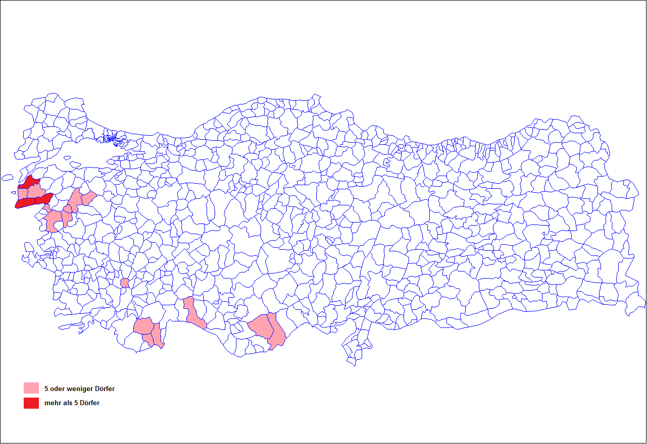 Tahtacıların yerleşim yerleri